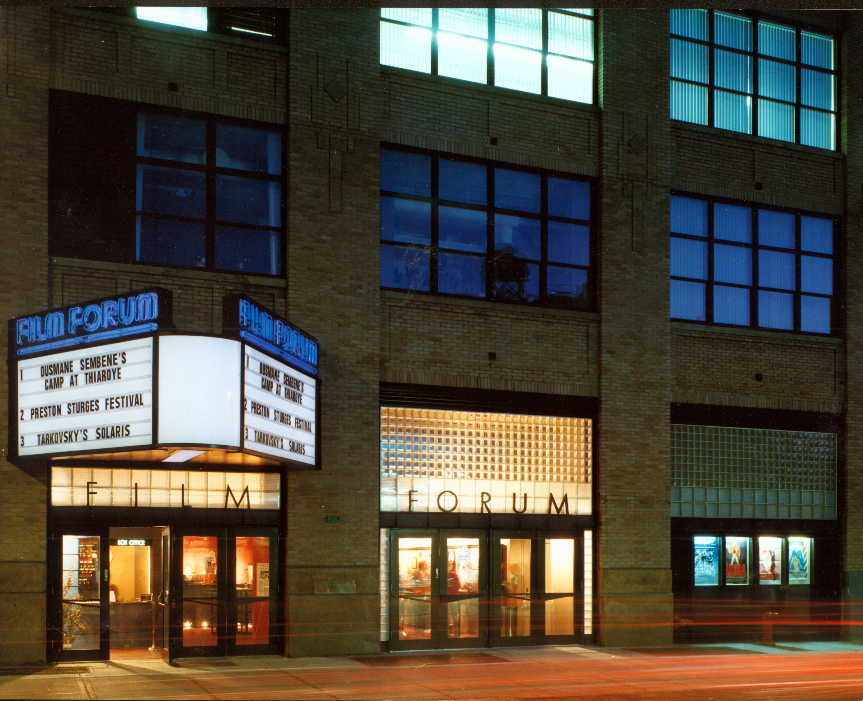 Film forum Marquee